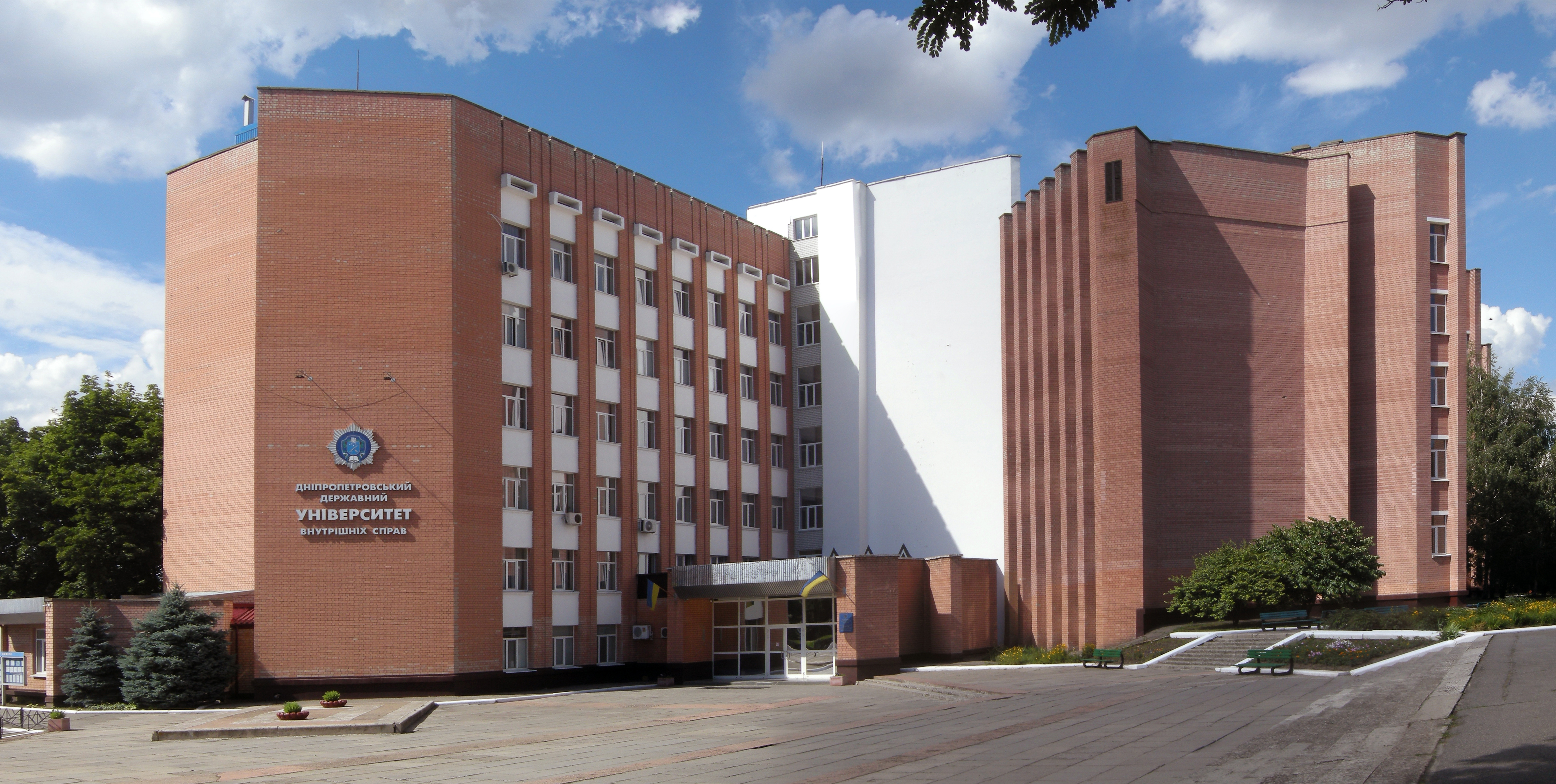 Днепропетровский государственный университет внутренних дел